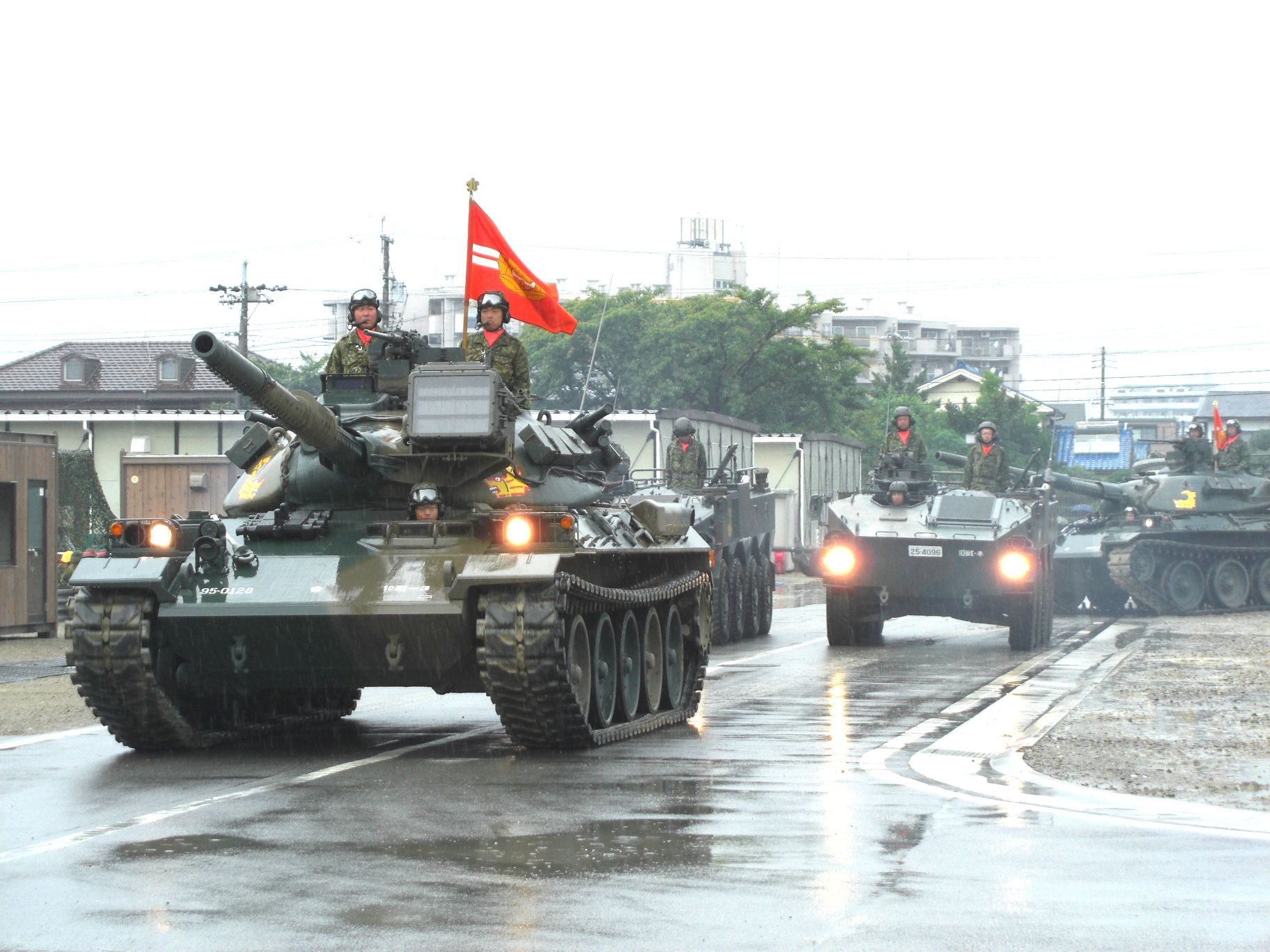 陸上自衛隊第10師団創立50周年記念行事、74式戦車と96式装輪装甲車。